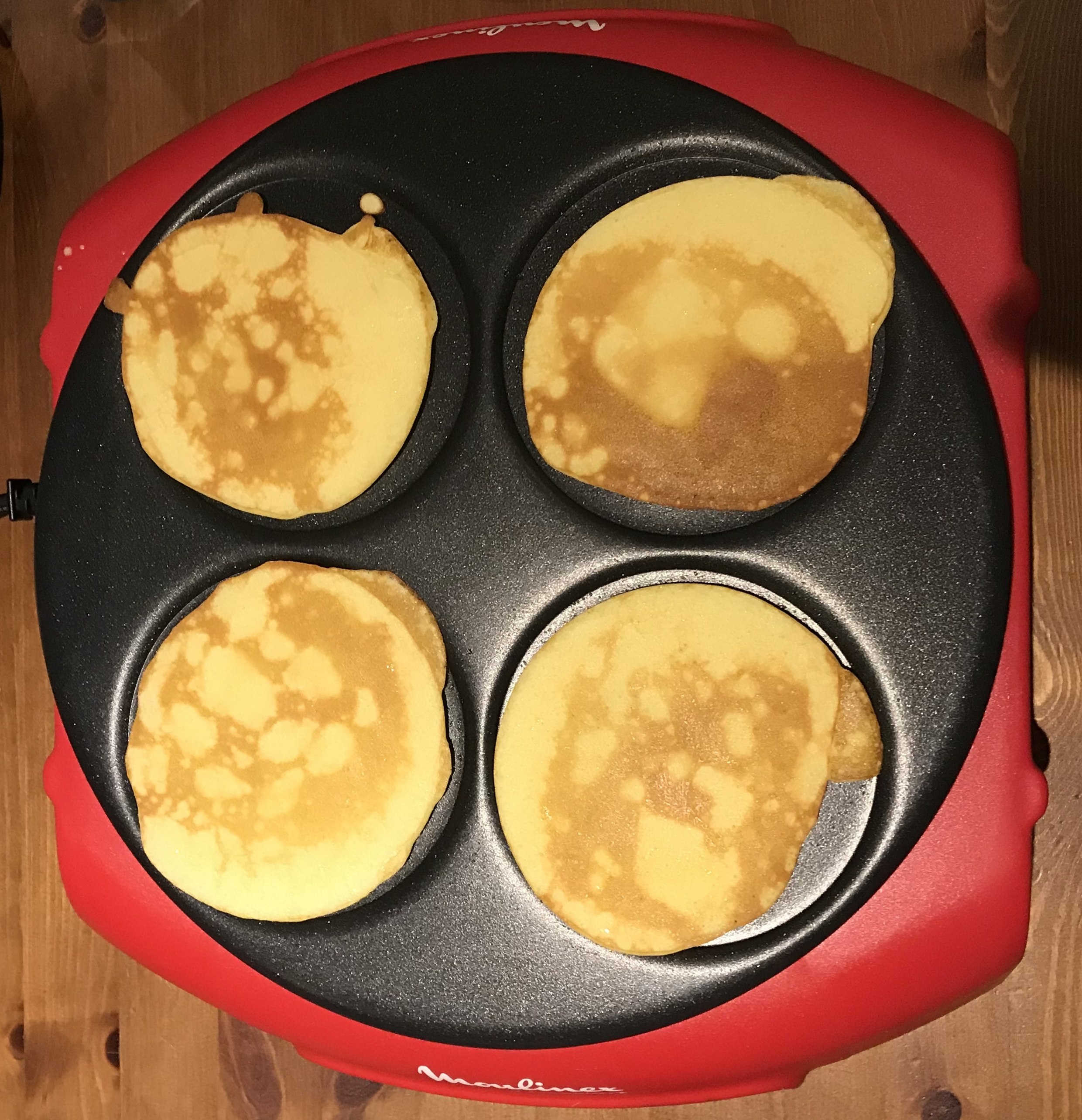 Crêpière